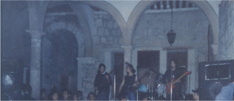 Comienzos quimera, presentacion en el leon de mecenas